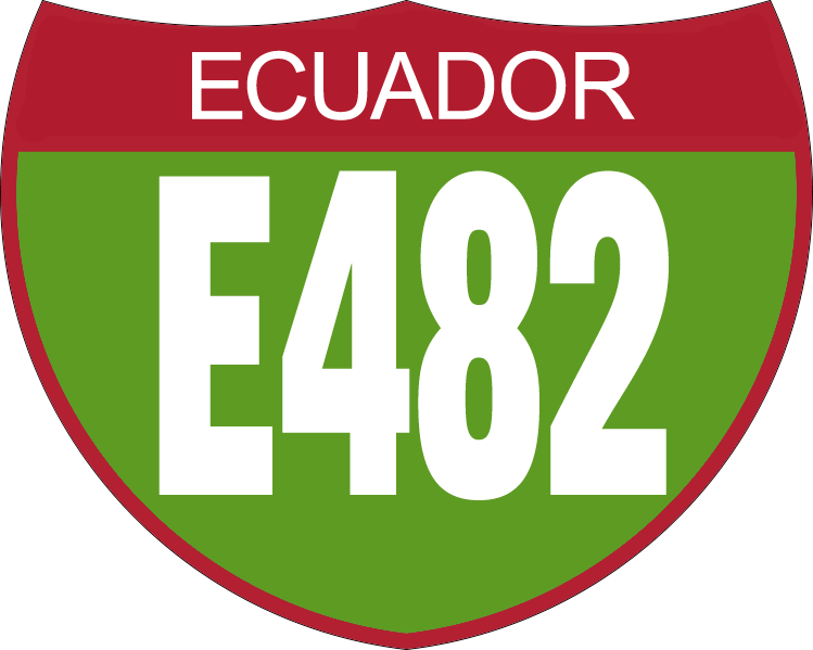 Disco de Identificación Ruta E482